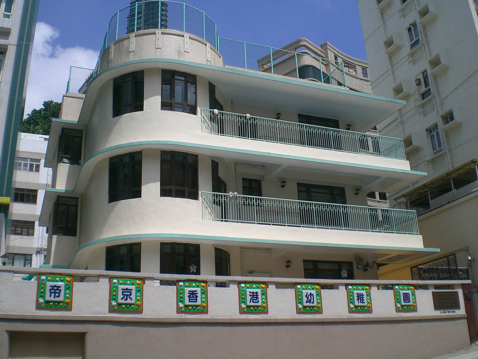 跑馬地成和道81號